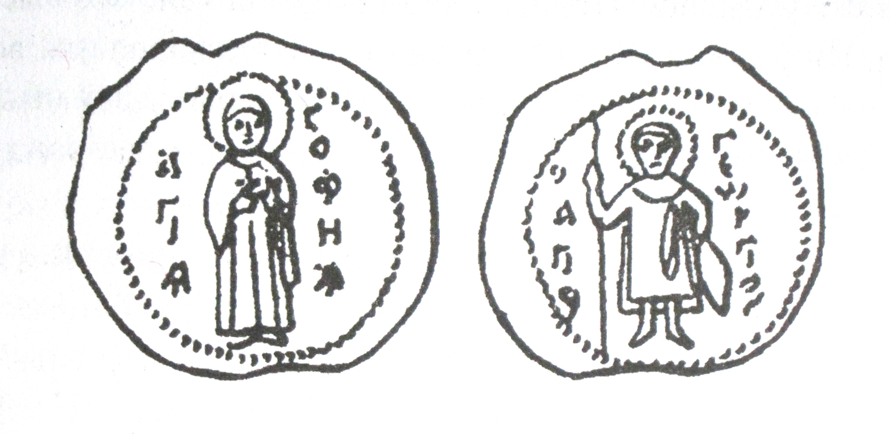 Пячатка князеў Георгія і Сафіі, бацькоў княгіні Ефрасінні Полацкай